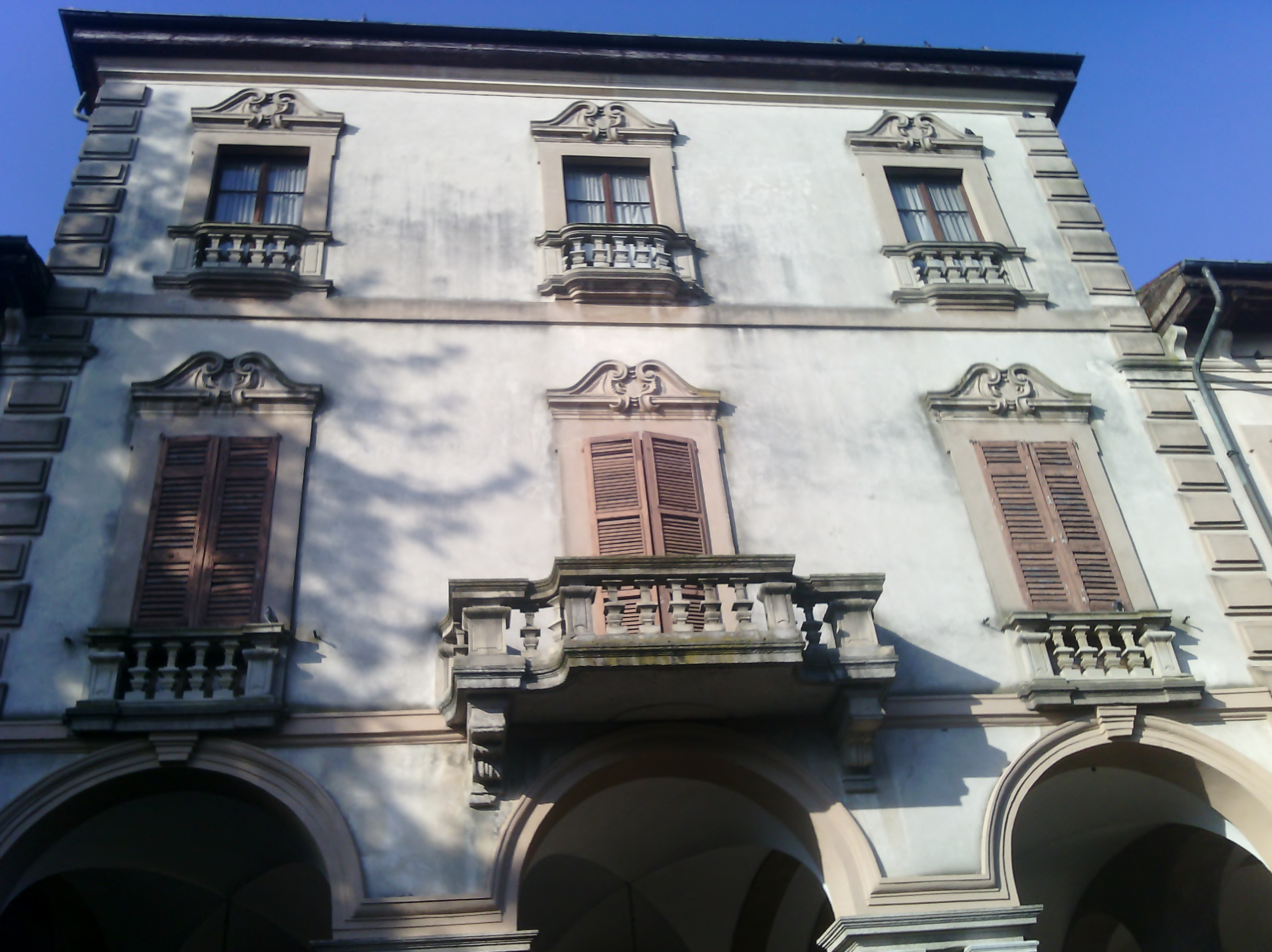 Facciata principale di Villa Resta a Vittuone (MI), Italy